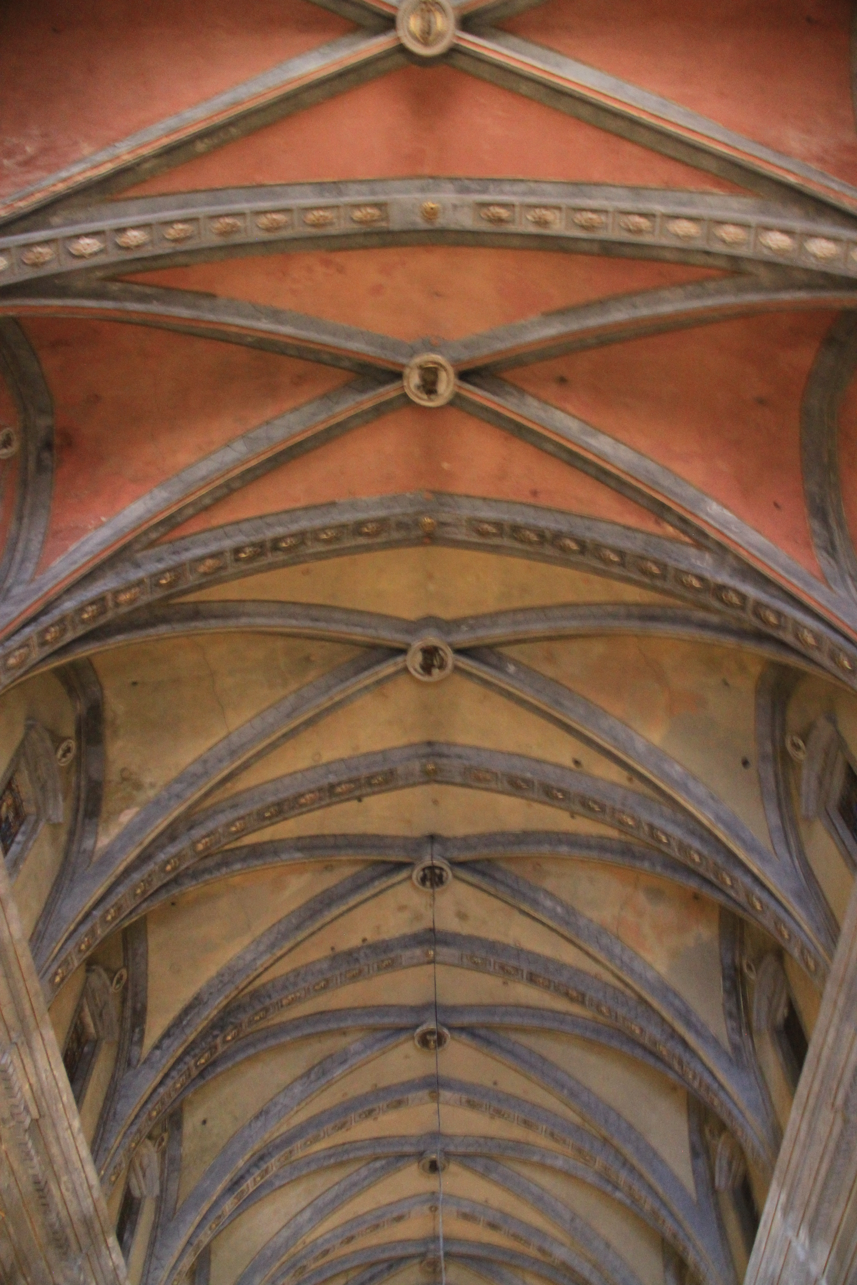 Церква святого Варфоломія (Церква Сант-Бартомеу), Сольєр, Мальорка, Іспанія.